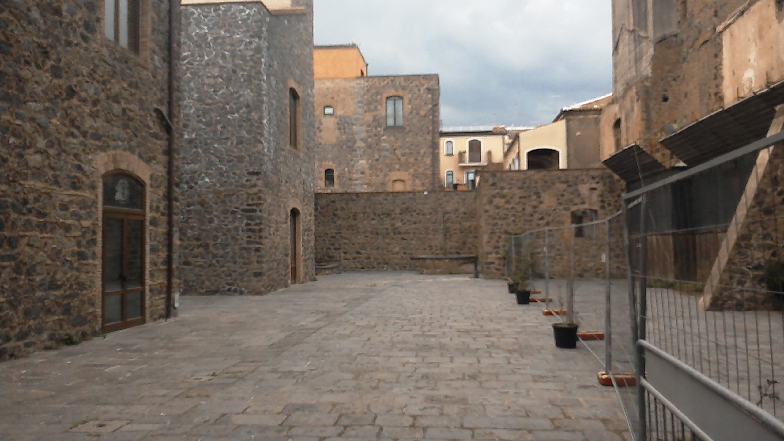 Cortile dello Stabilimento di Monaco - Misterbianco